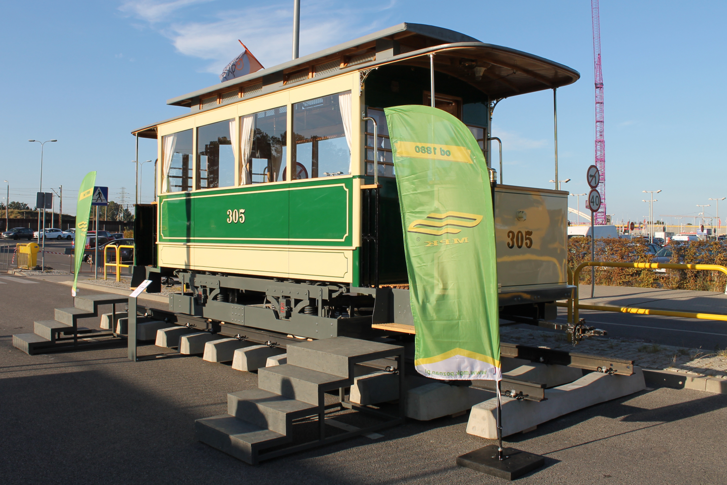 Tramwaj Carl Weyer podczas targów Trako 2015. The making of this document was supported by Wikimedia Polska Association, within Wikigrant no. WG 2015-34.